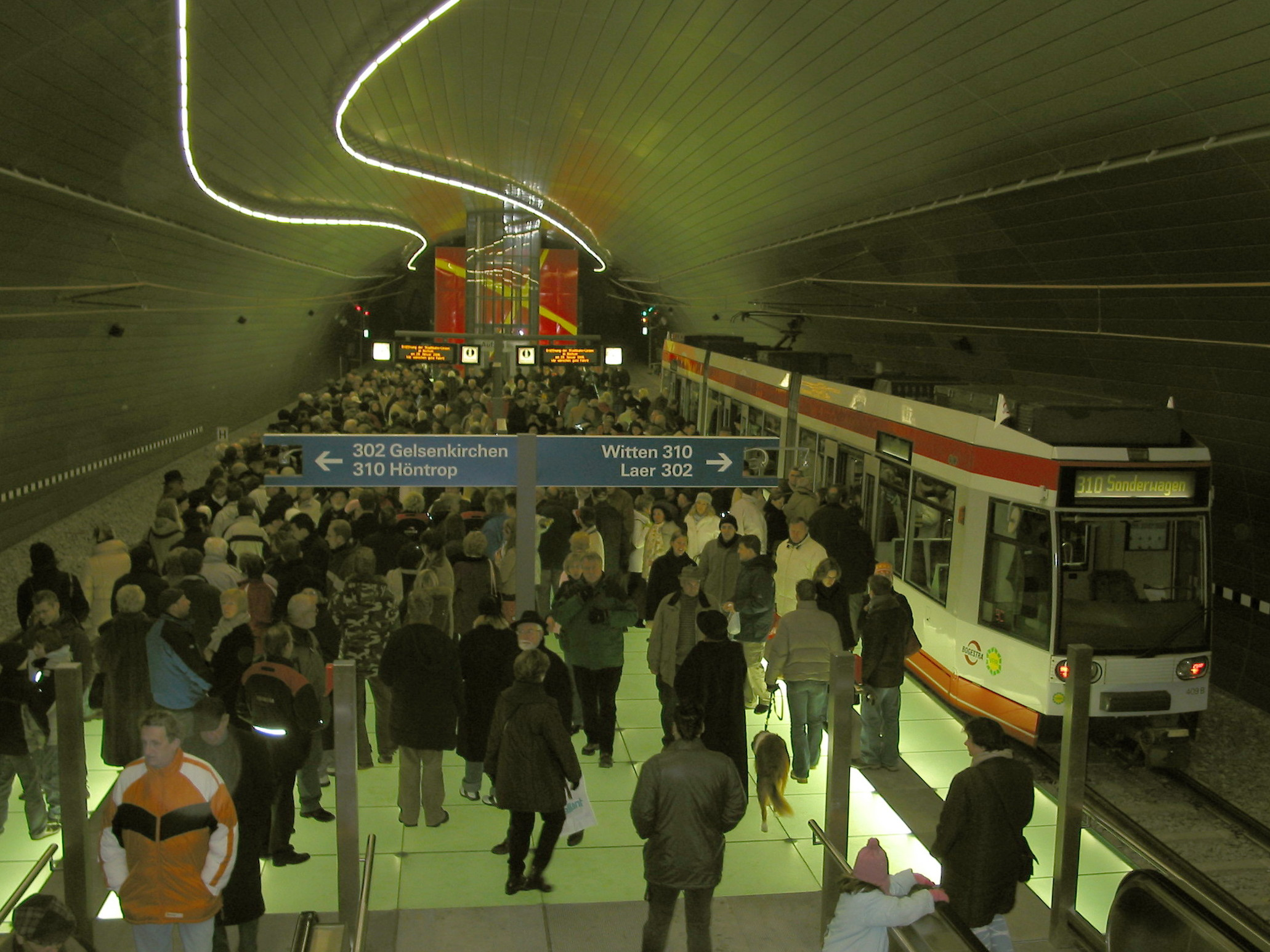 Station Lohring der BOGESTRA am Tag der Eröffnung der Tunnelstrecke